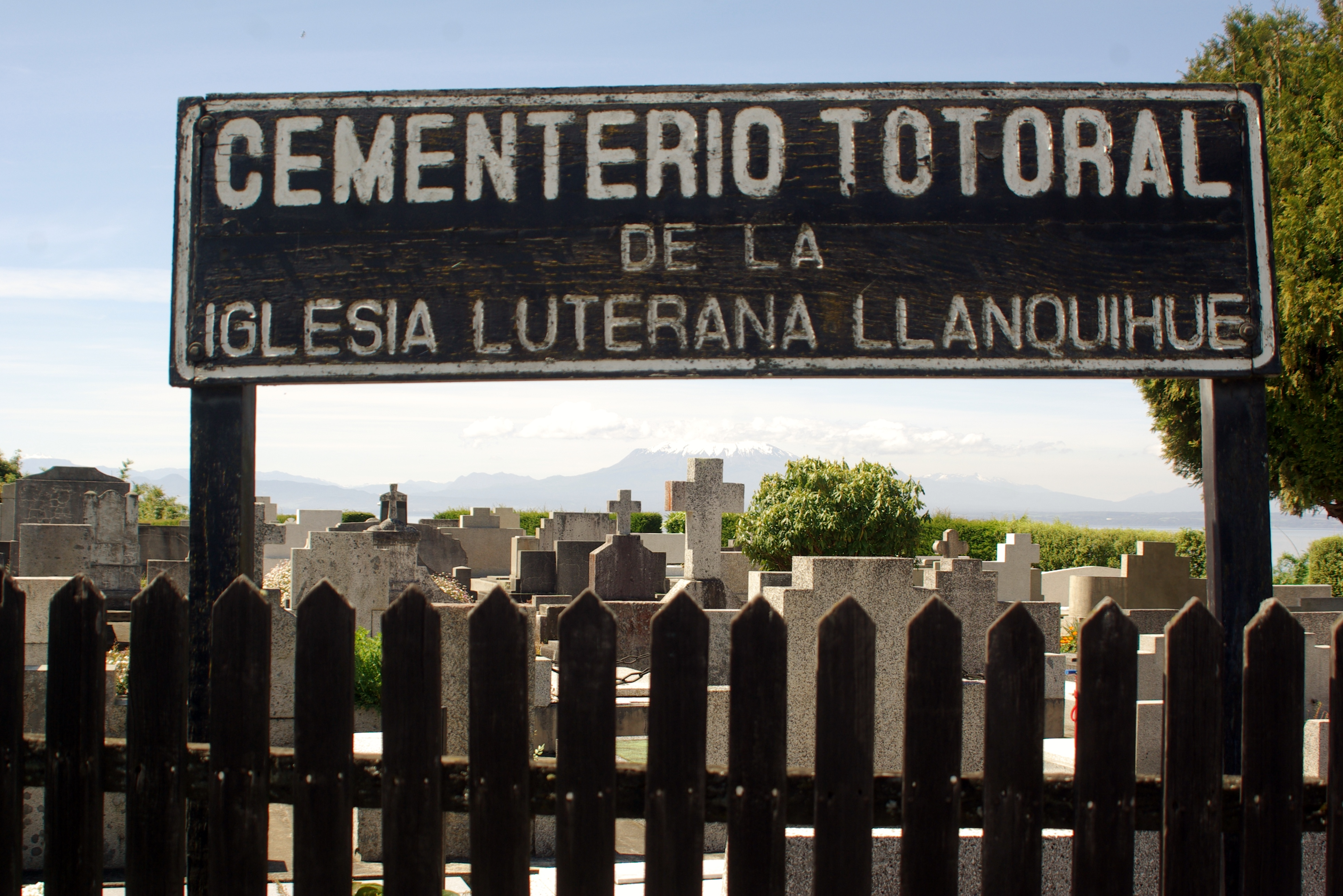 Cementerio Totoral de la Iglesia luterana de Llanquihue, ubicado en la comuna de Llanquihue, frente a la colina donde se encuentra el monumento Unsern Ahnen